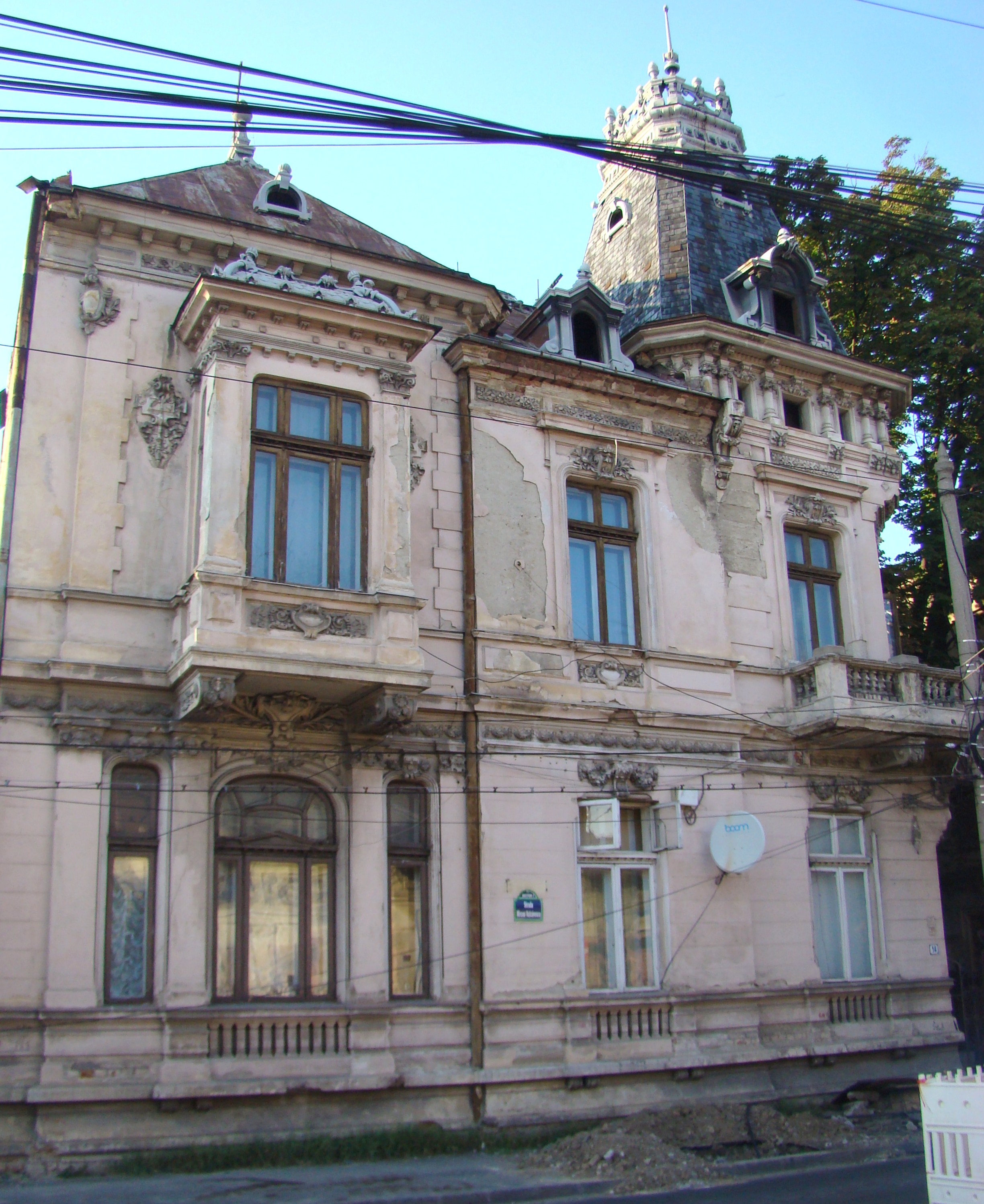 Clădire monument istoric, str. Mircea Vulcănescu, nr.14